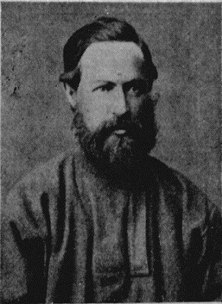 Vasilij L'vovic Perovskij (1840-1941)